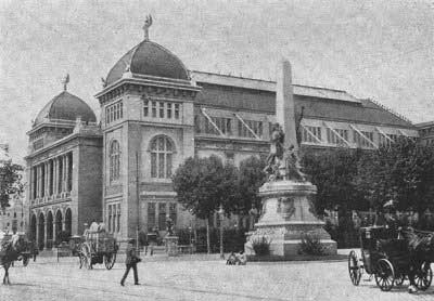 Palau de Belles Arts (Barcelona-Catalunya), obra d'August Font i Carreras fet en 1888 per a l'Exposició Universal de Barcelona-1888. Enderrocat en 1942.